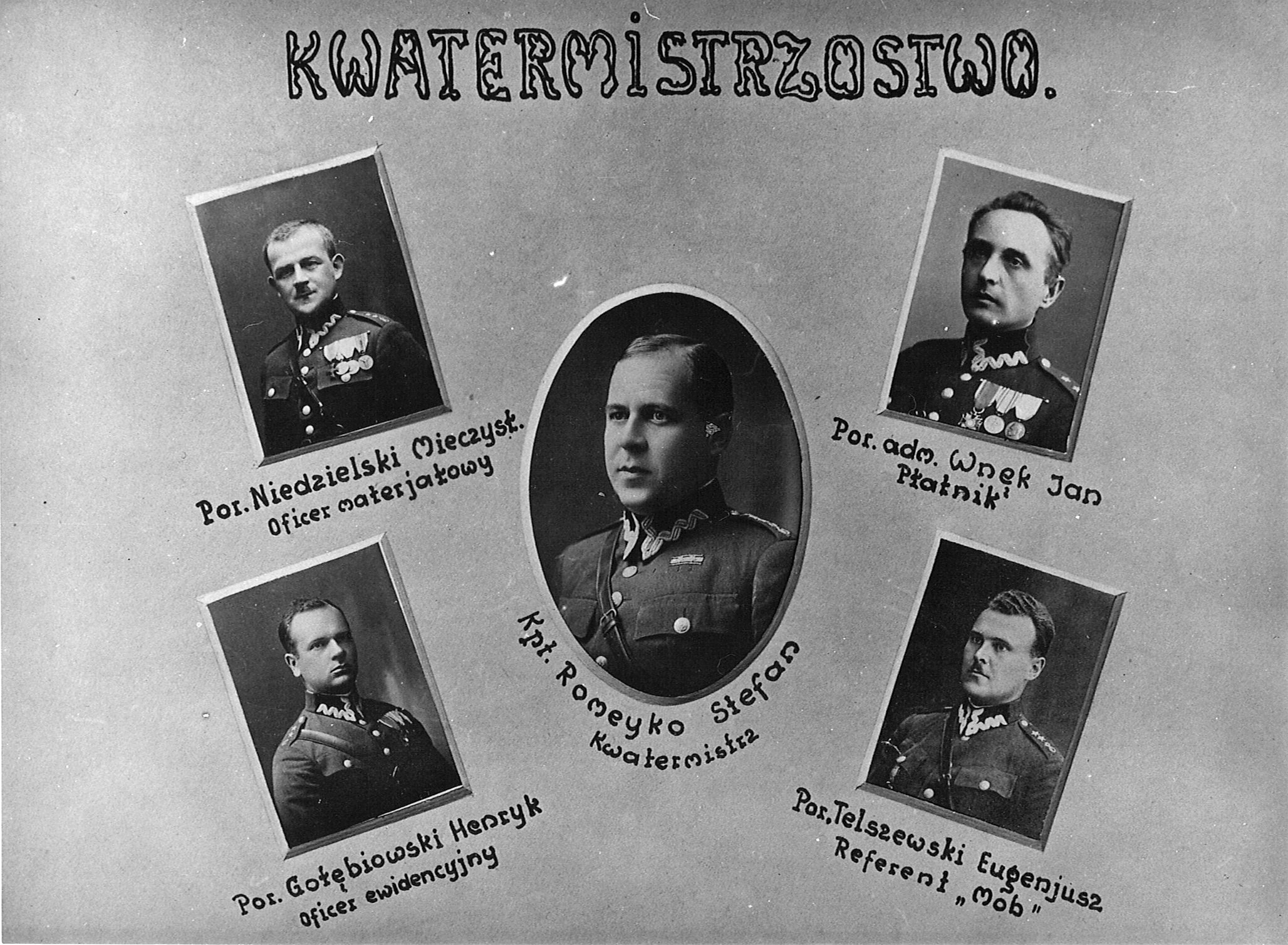 zdjęcie z albumu